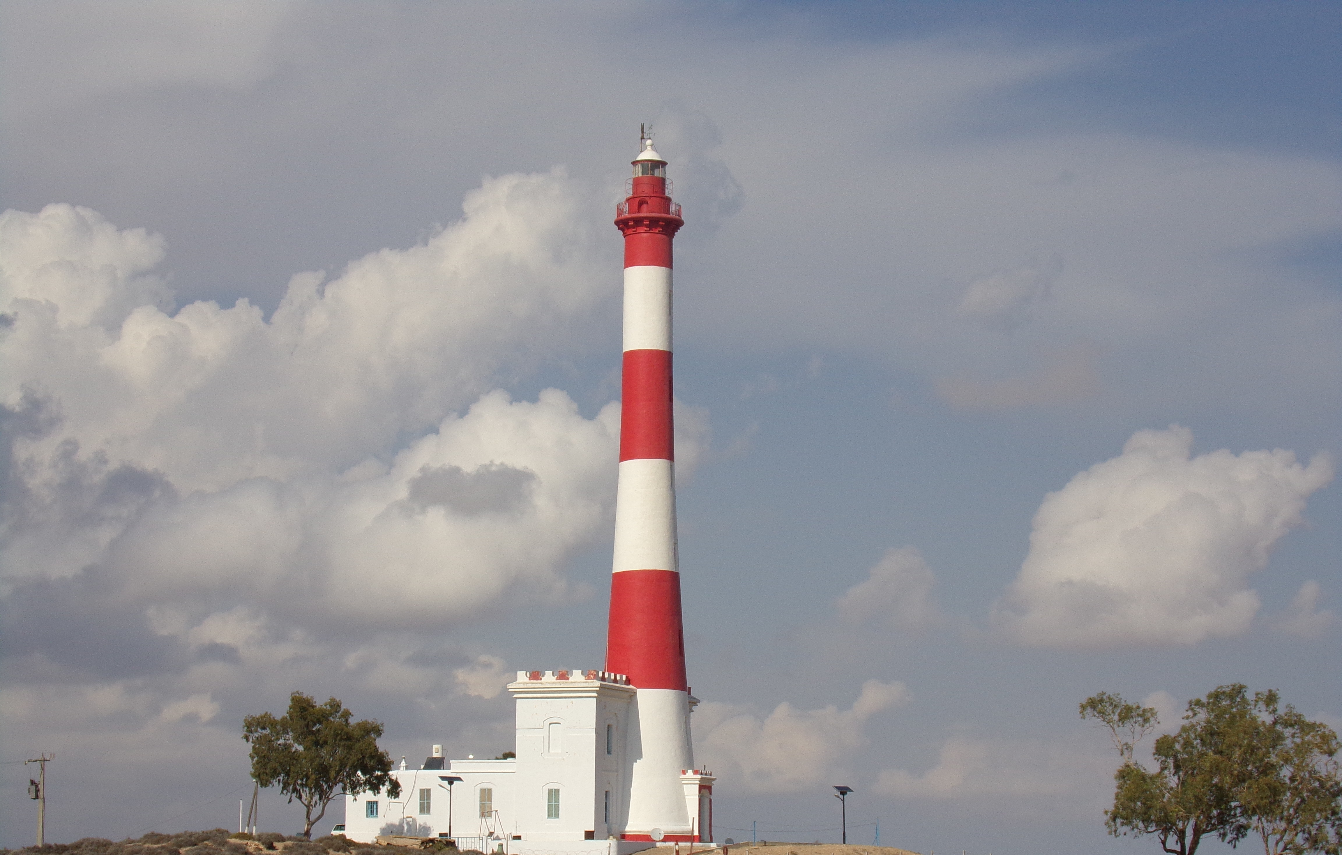 Phare de Thyna (Tunisie)